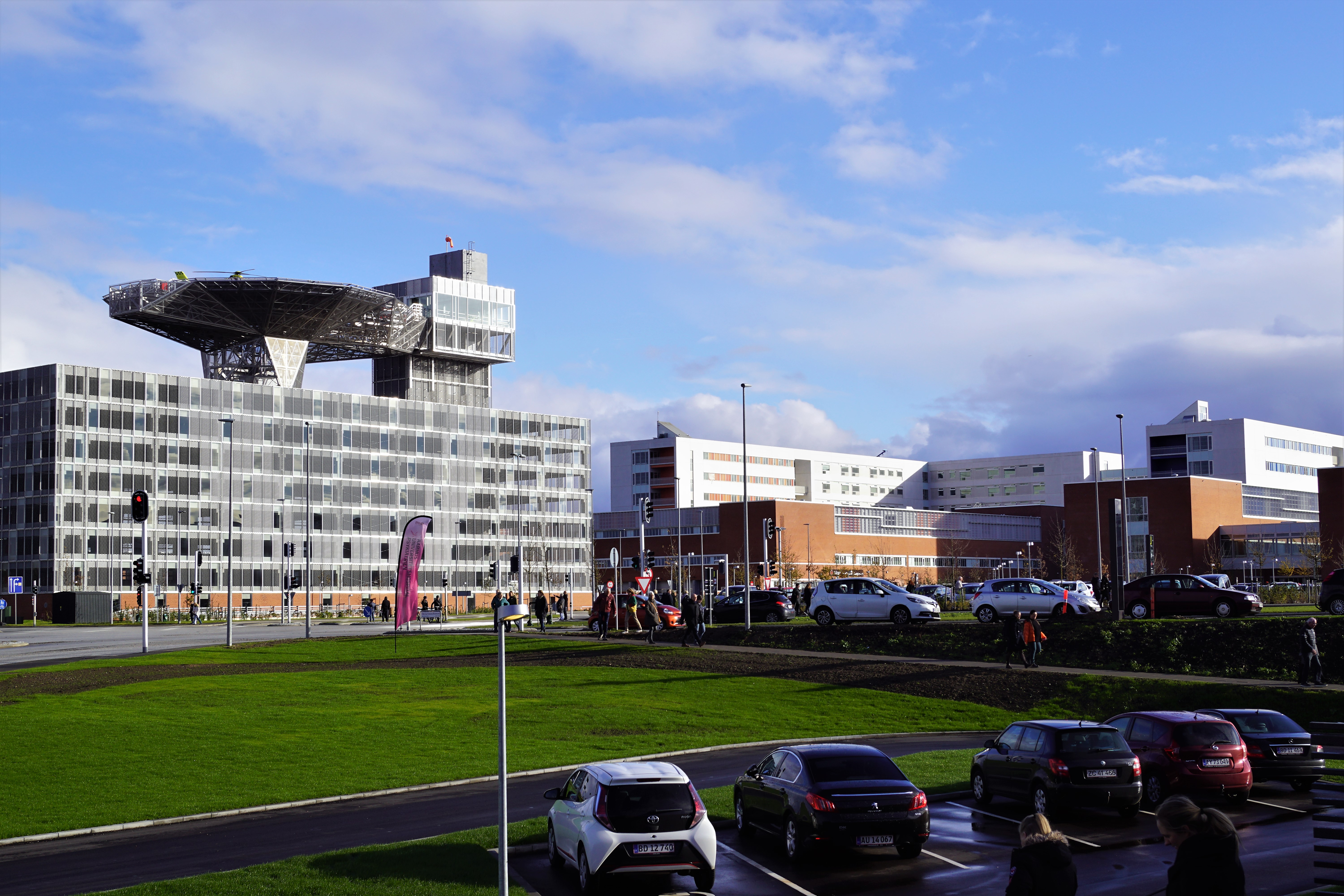 Aarhus Universitetshospital, Skejby set fra norddvest. Parkeringshus med helikopterplatform. Indgang til skadestue ligger mellem de to røde bygninger.